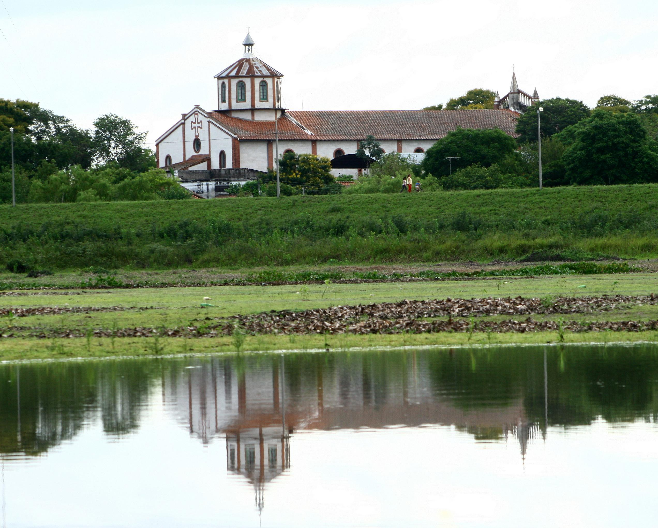 Vista de la catedral de la Virgen del Pilar reflejada en las aguas del arroyo Ñe´embucú.